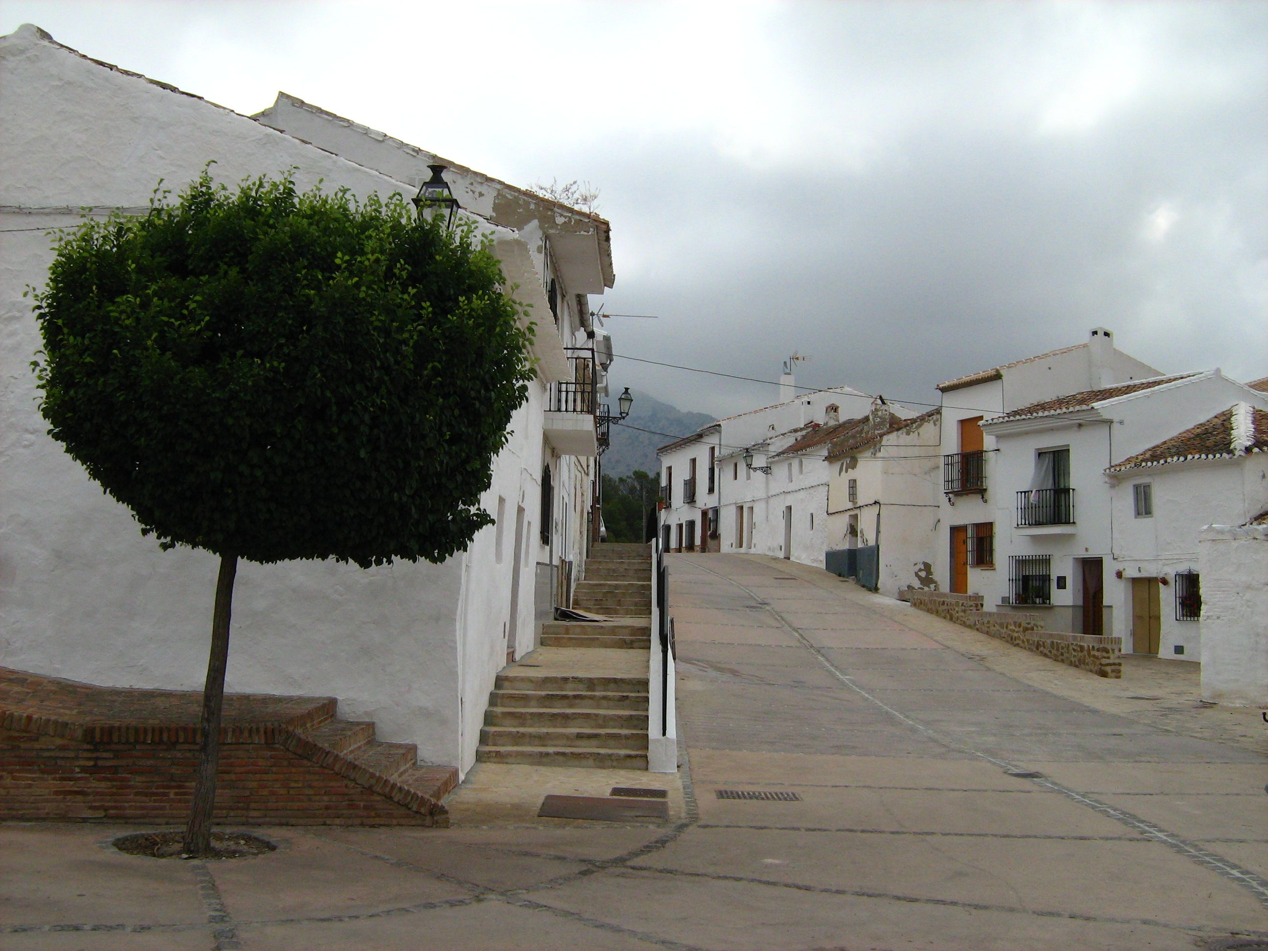 Vista de una calle de este pueblo tan peculiar.